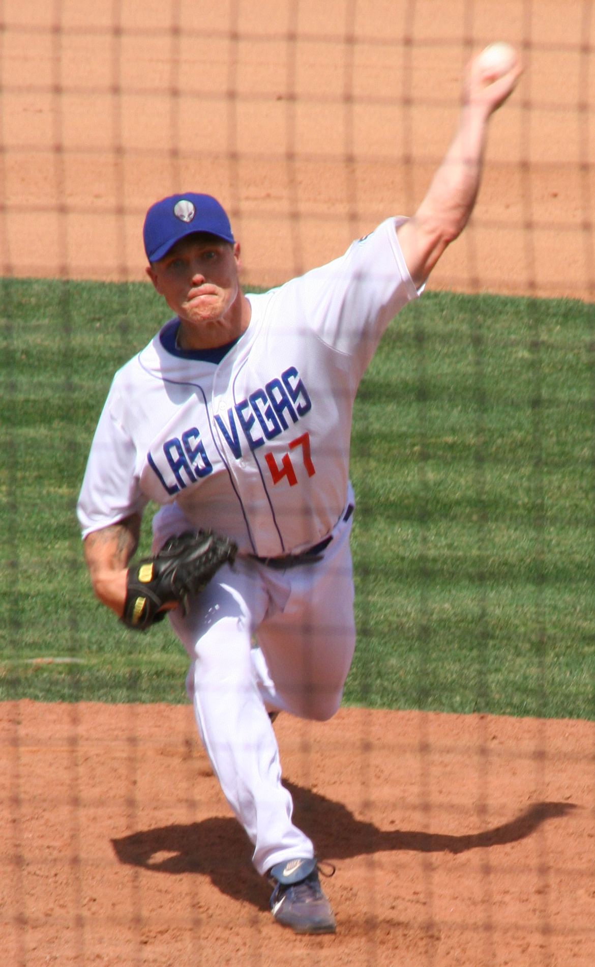 Matt Riley